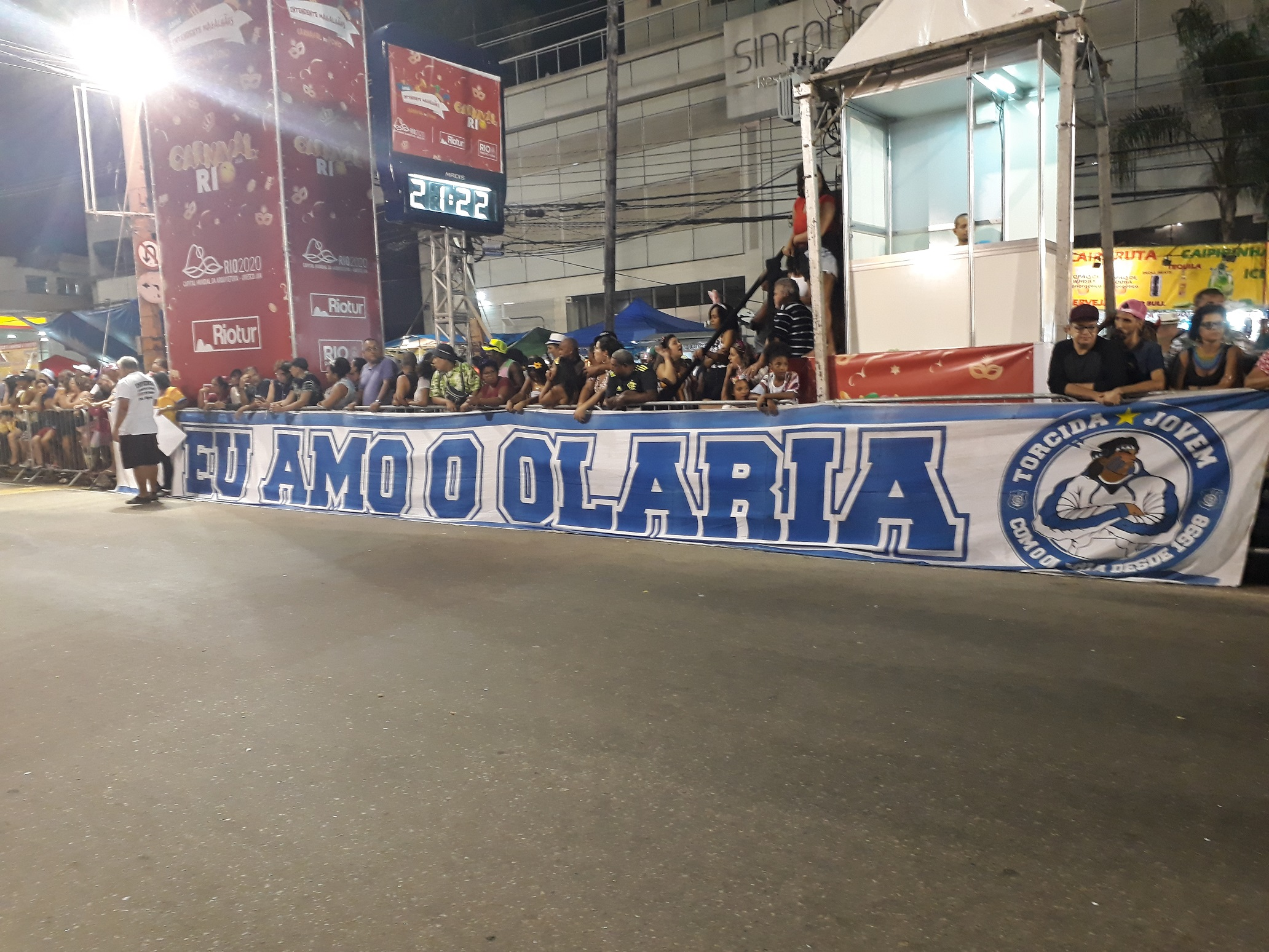 GRES Independentes de Olaria